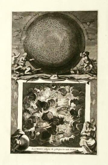 Anon. / from Voor-bereidselen tot de bybelsche wysheid, en gebruik der heilige en kerkelijke historien etc (copper engraving of the origin of universe)